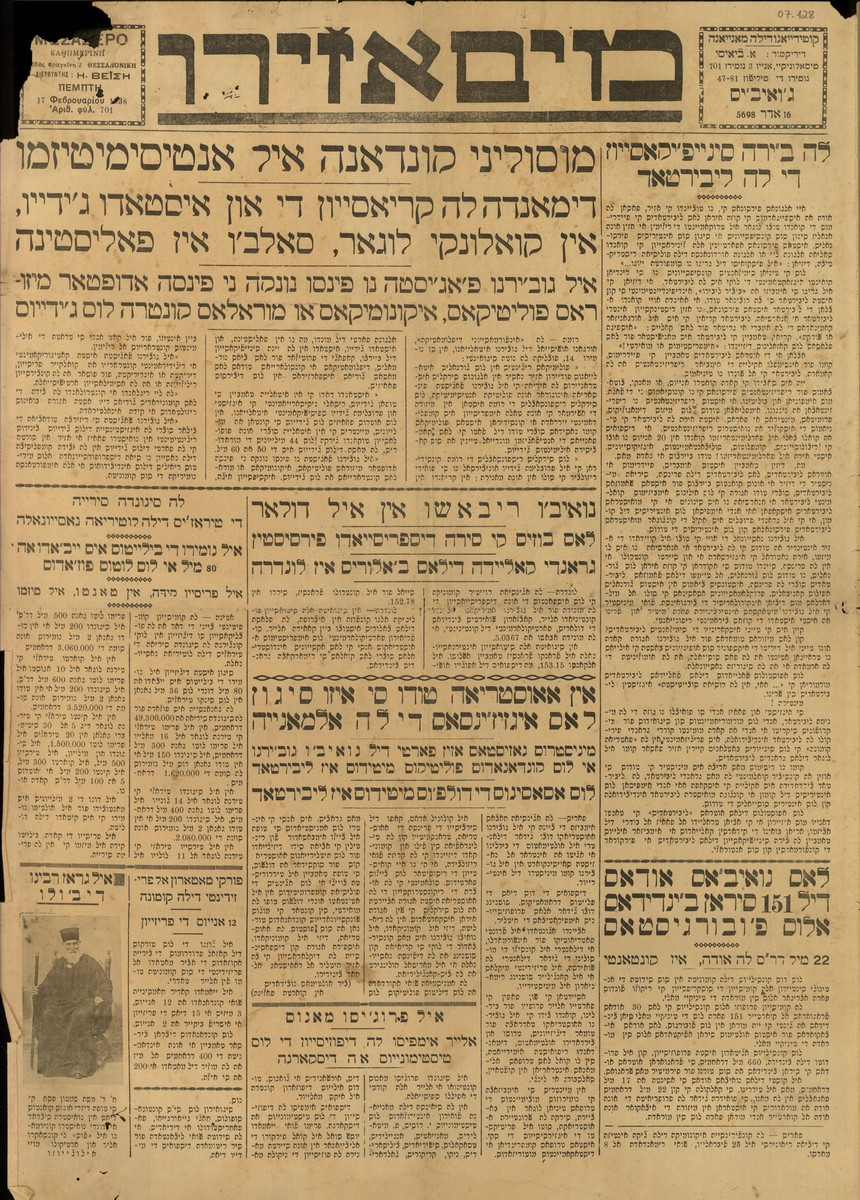 "Messagero".